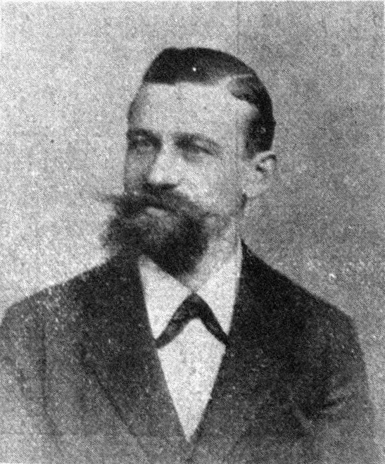 Österreichischer Politiker, Reichsratswahl 1907, Name siehe Dateiname